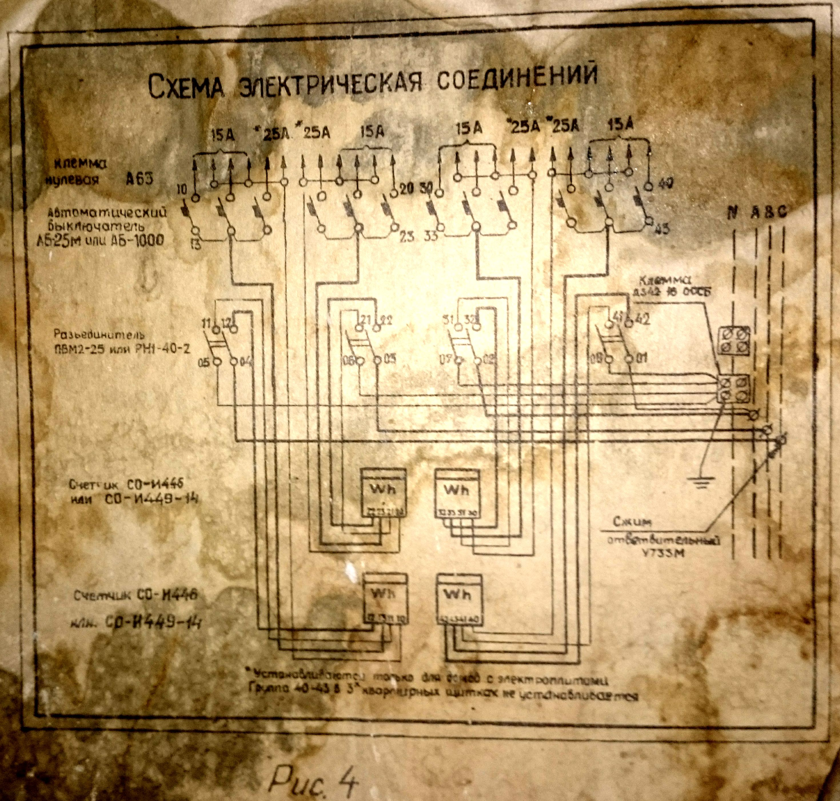 Схема электрическая соединений - этажный распределительный щит 111-121-2